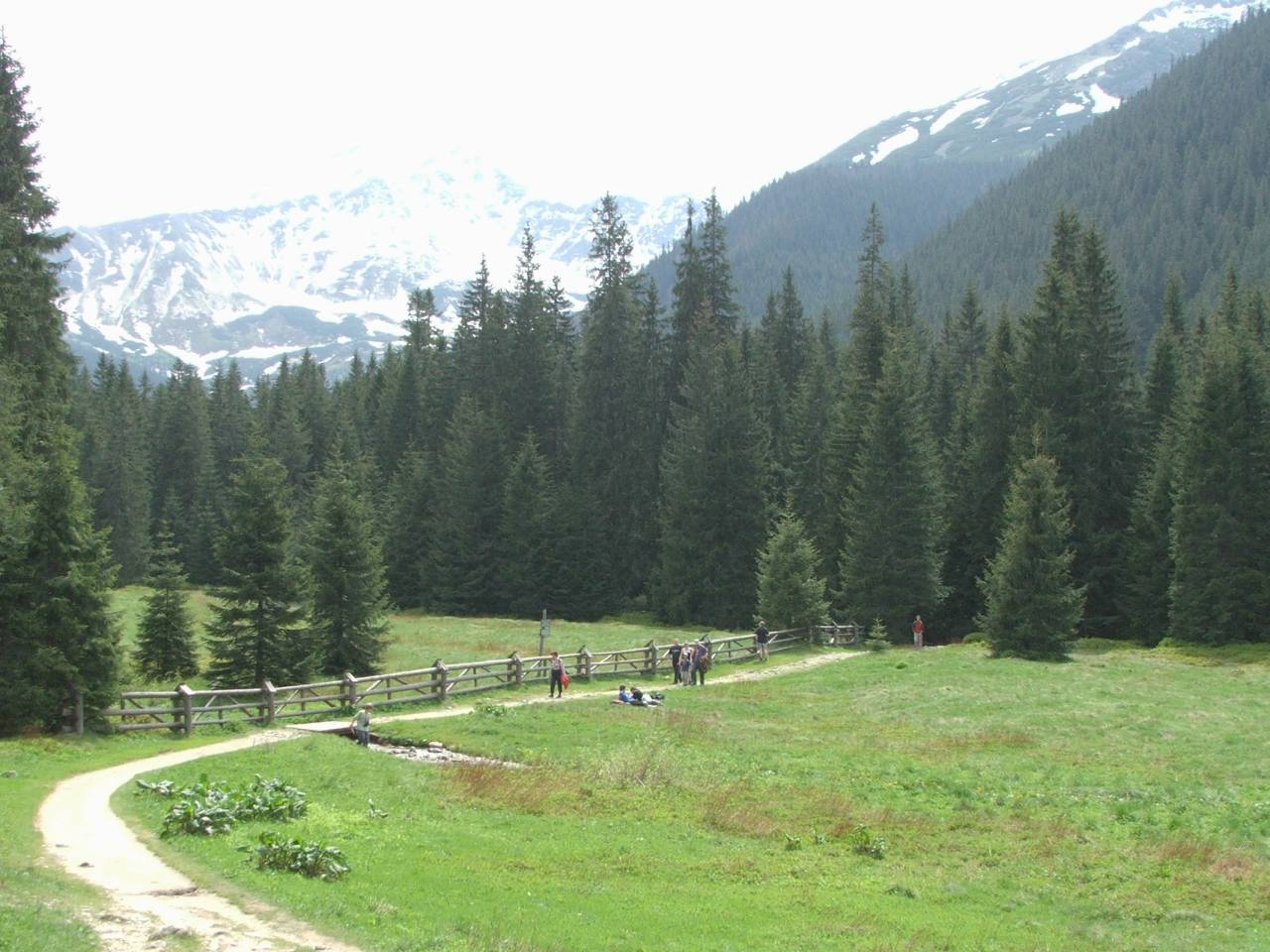 Mała Polana Ornaczańska(Dolina Kościeliska)